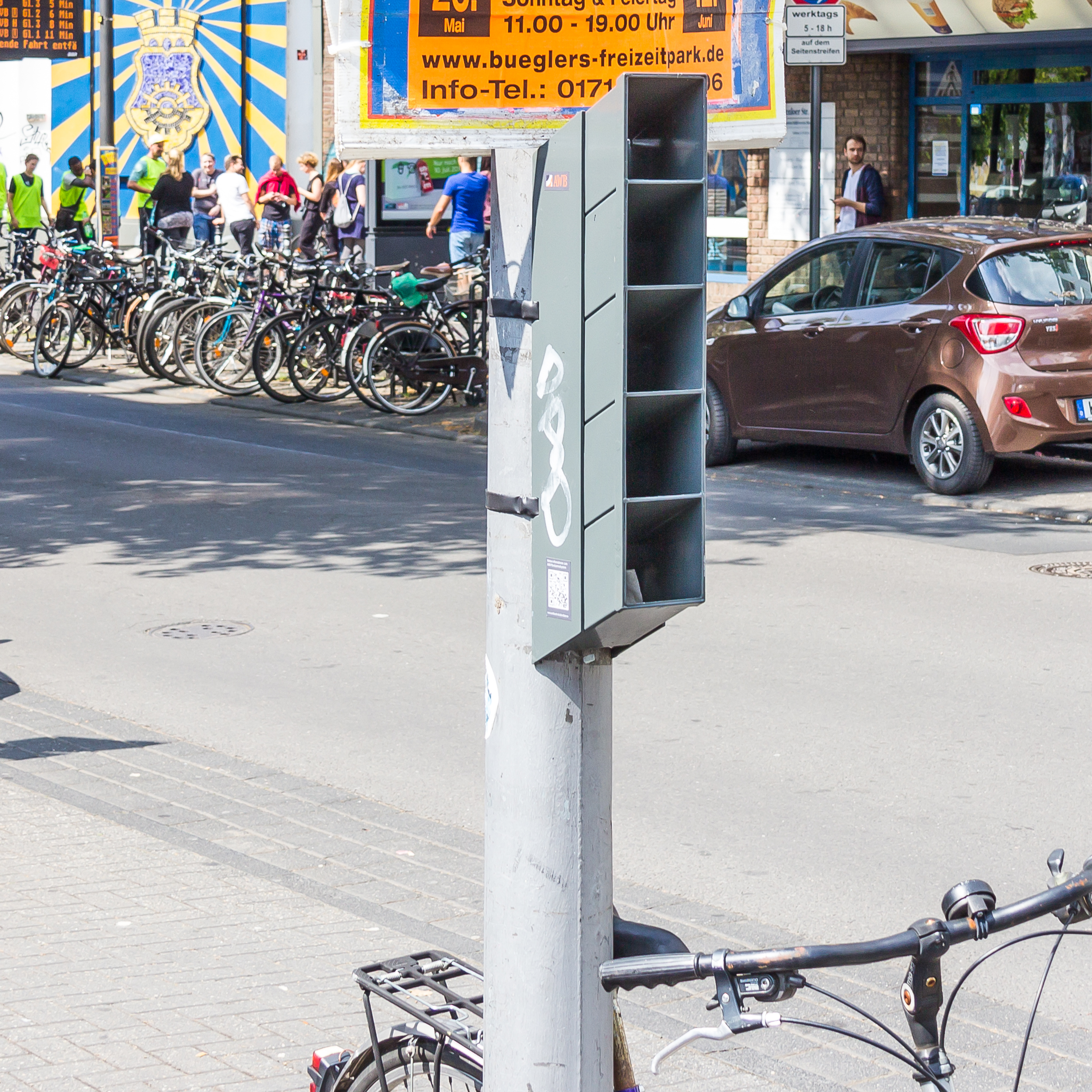 Pfandlaterne, angebracht an einer Laterne vor Venloer Straße 385, Köln-EhrenfeldErgebnis Pilotversuch Pfandringe vom Februar 2016 (unter „Anlage 856 KB“ oben rechts)